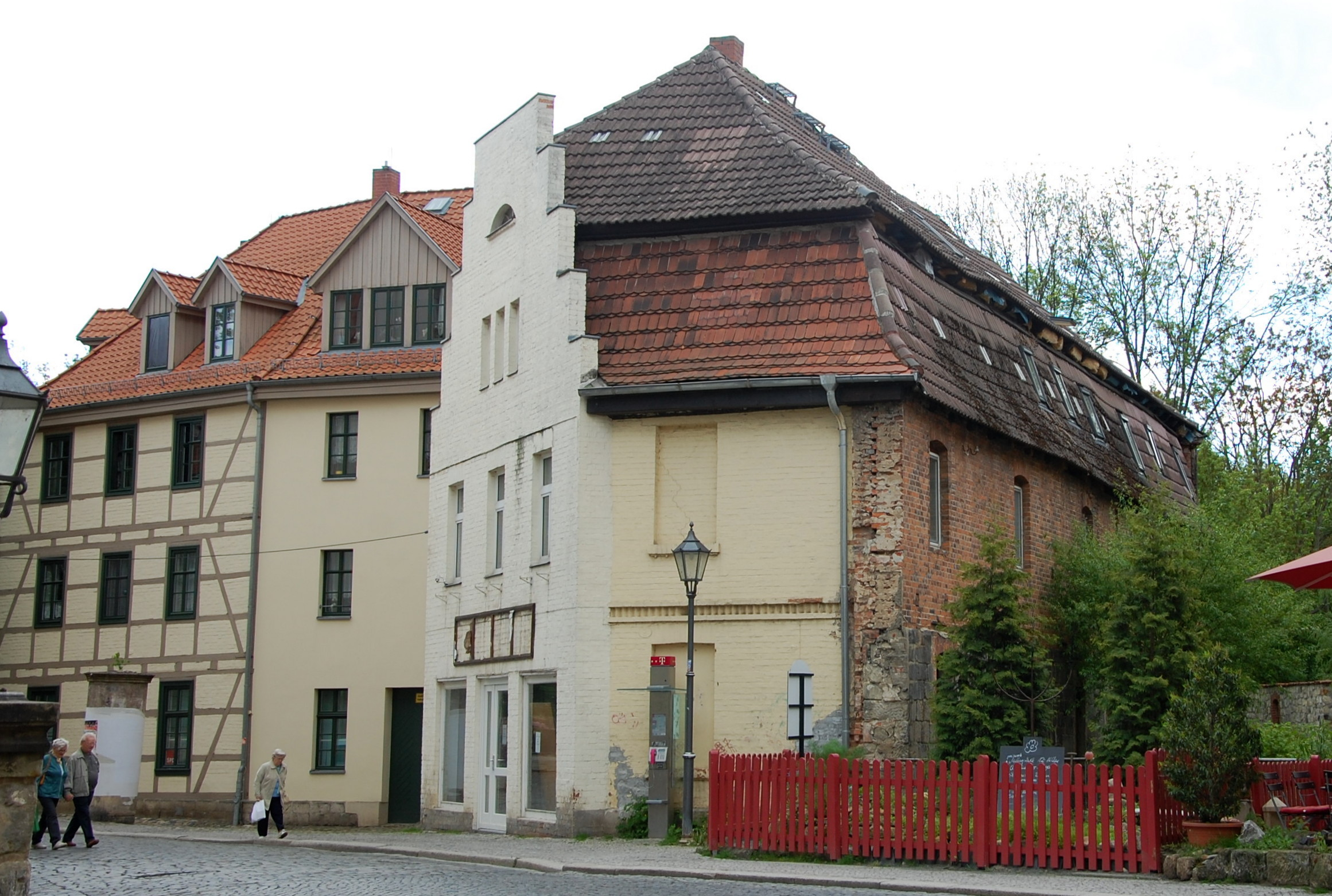 Haus Zwischen den Städten 4 in Quedlinburg